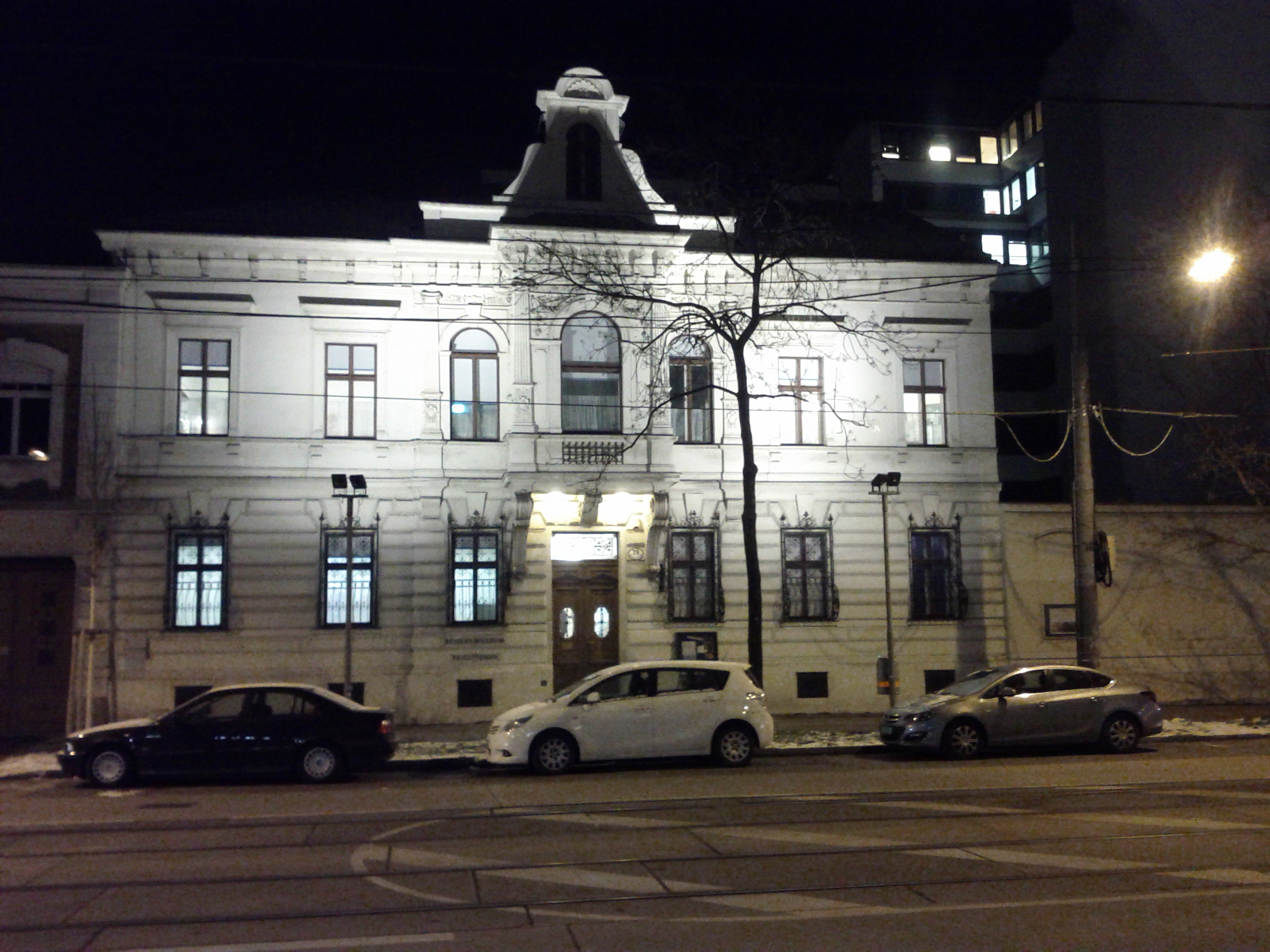 Straßenfront des Bezirksmuseums Wien-Brigittenau, 20.,Dresdner Straße 79 - Nachtaufnahme